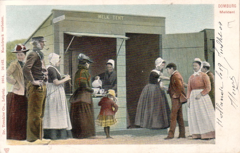 Ansichtkaart uit 1904, verzameling Dolph Kohnstamm